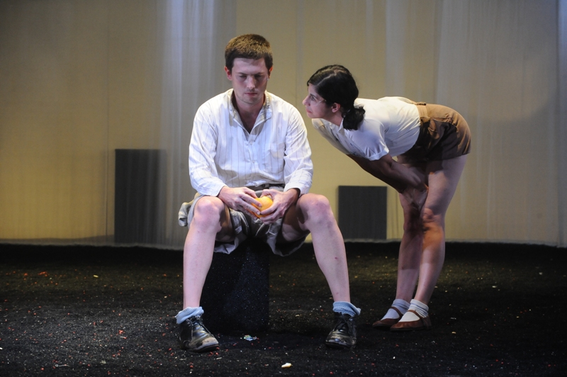 הנרי דוד ואפרת בן-צור ביונה ונער 2011